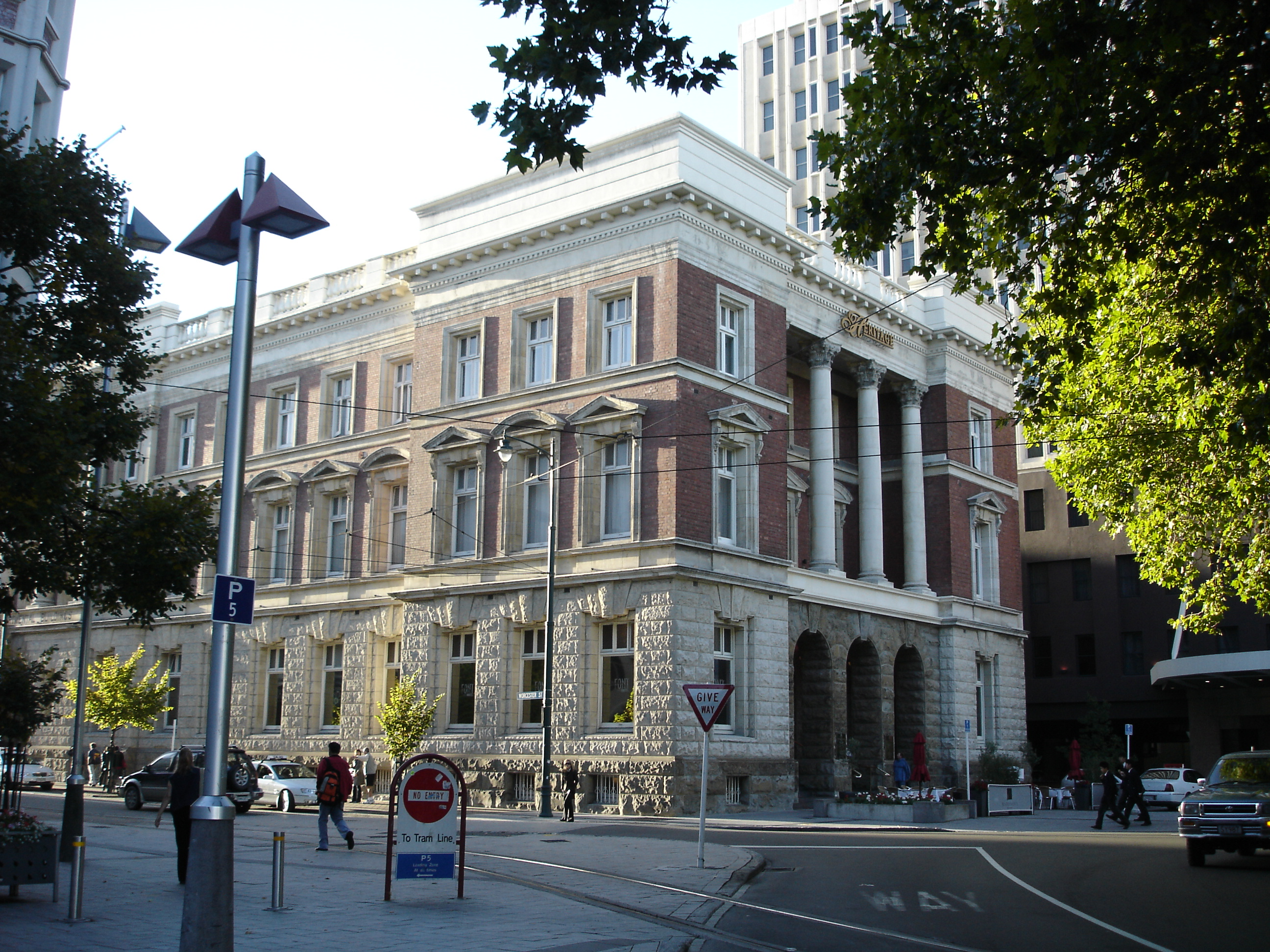 Hotel Heritage Christchurch